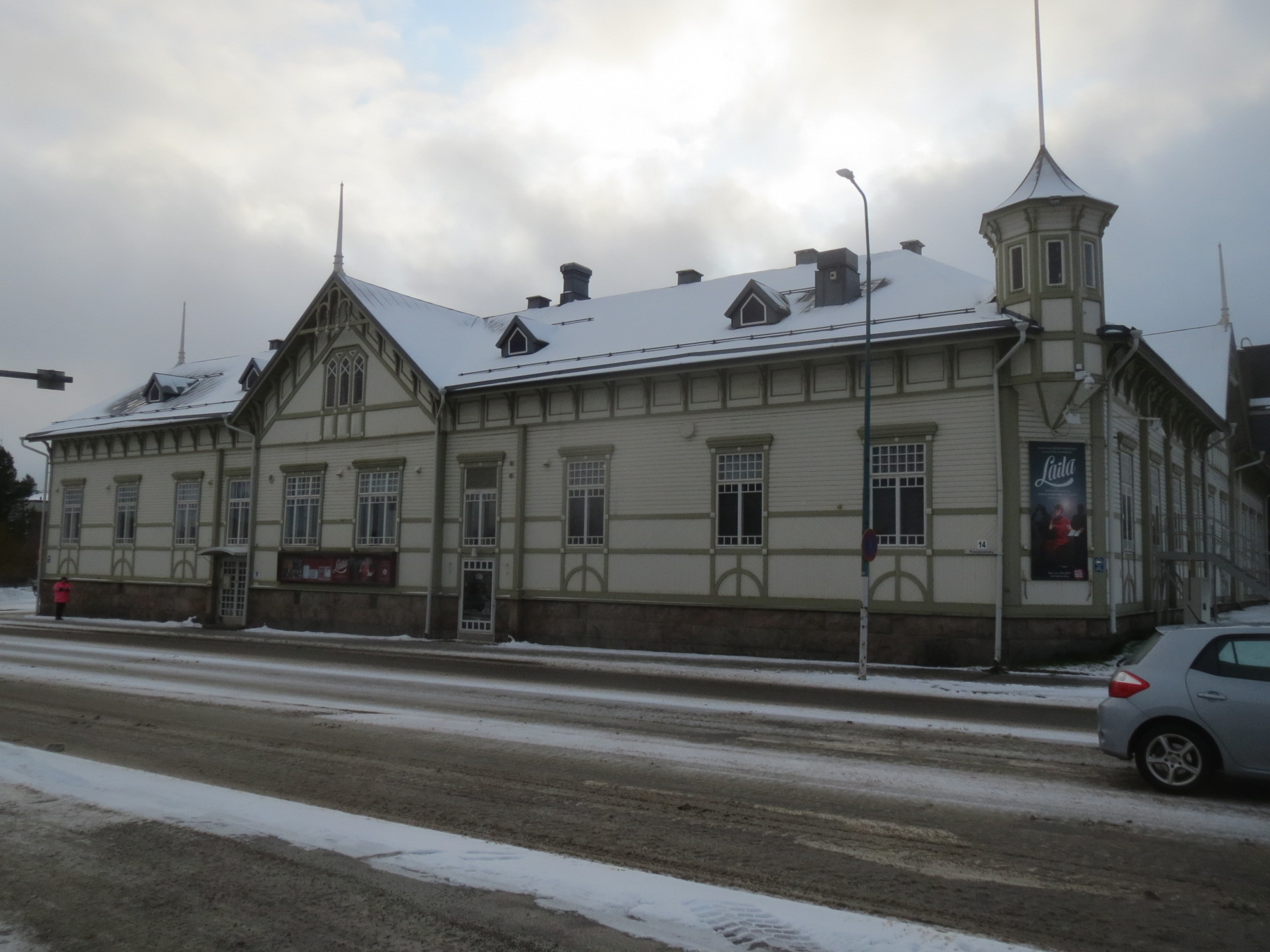 Kajaanin kaupunginteatteri 2019